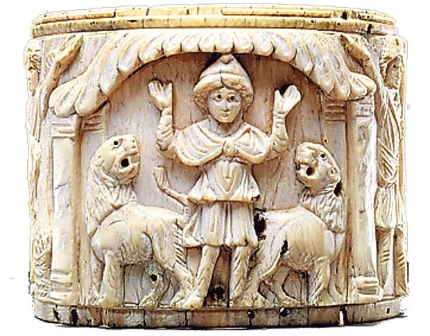 Daniel in the lions' den 6th century Egypt